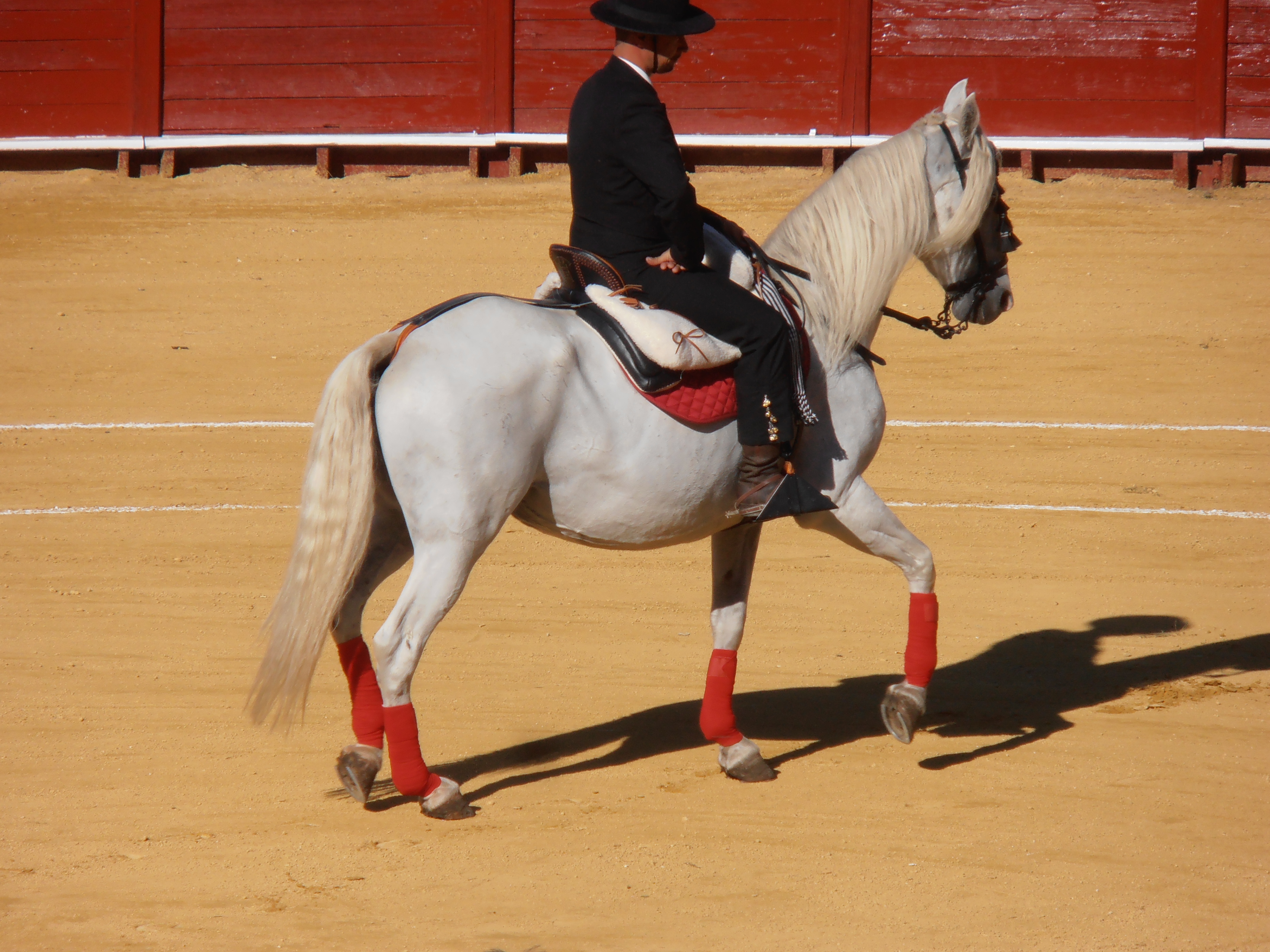 Alguacilillo realizando el despeje de plaza en la plaza de toros de Béjar